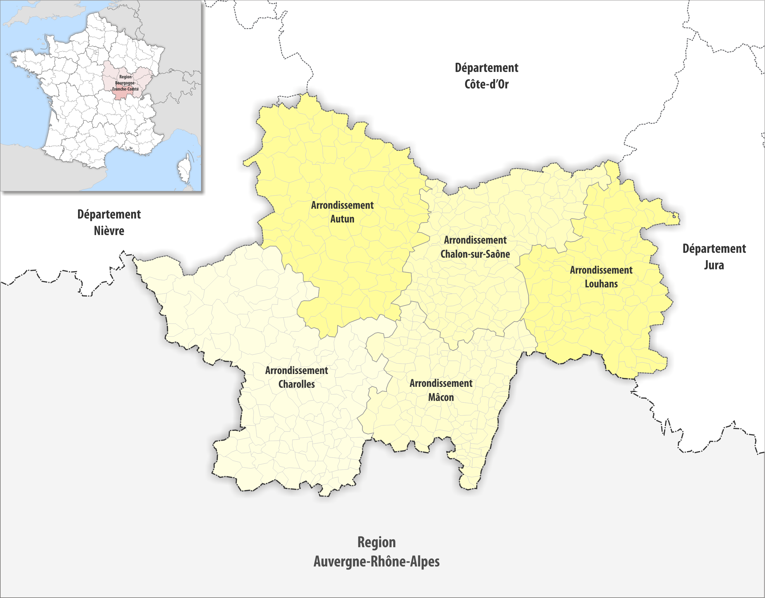 Gemeinden und Arrondissemente im Departement Saône-et-Loire